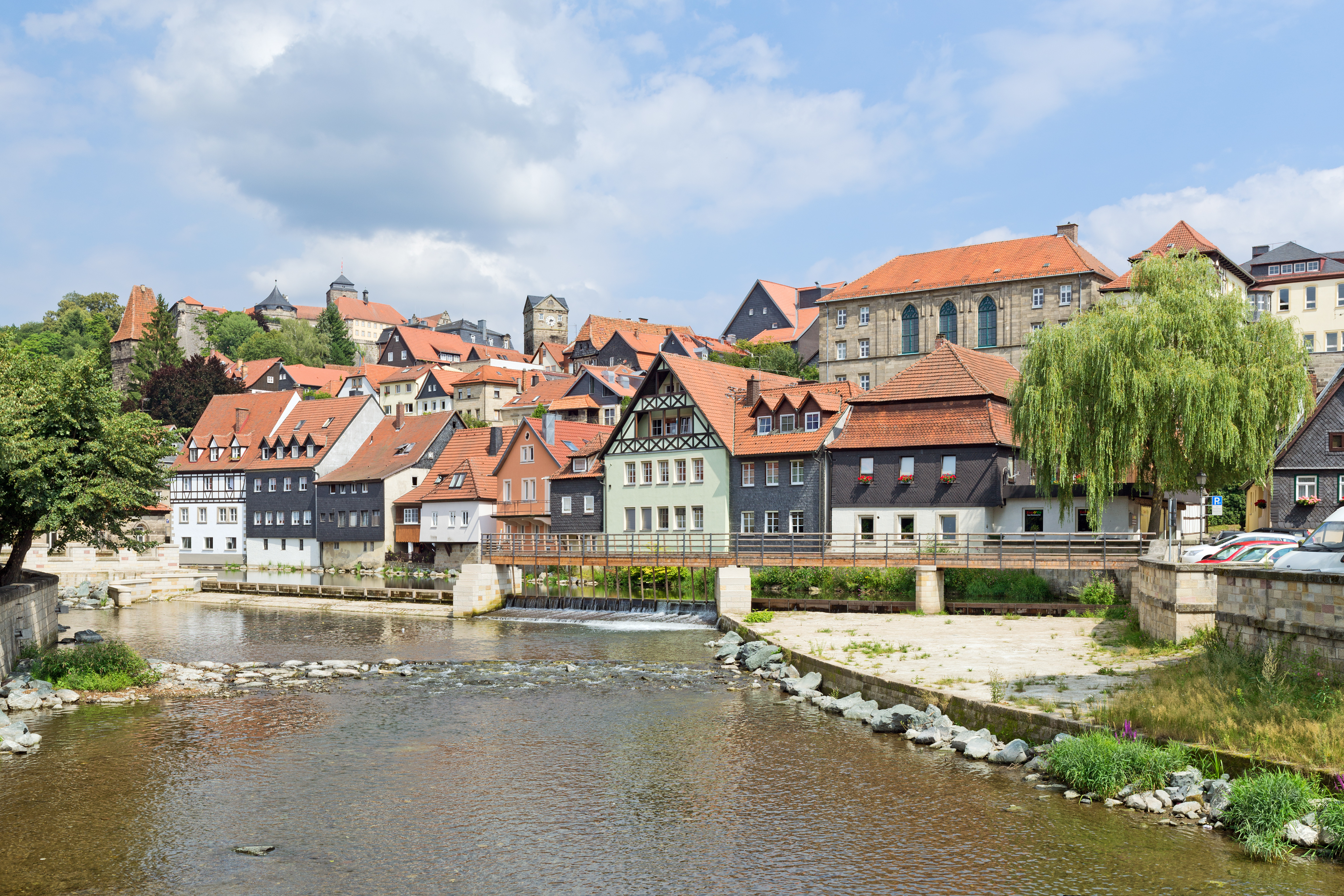 Der dreistufige Stadtaufbau der oberfränkischen Stadt Kronach an der Haßlach, unterhalb des Steinwehrs: Direkt am Fluss die Gebäude der Vorstadt, darüber die von einer Stadtmauer umschlossene Altstadt und im Hintergrund links die oberhalb von Kronach gelegene Festung Rosenberg.